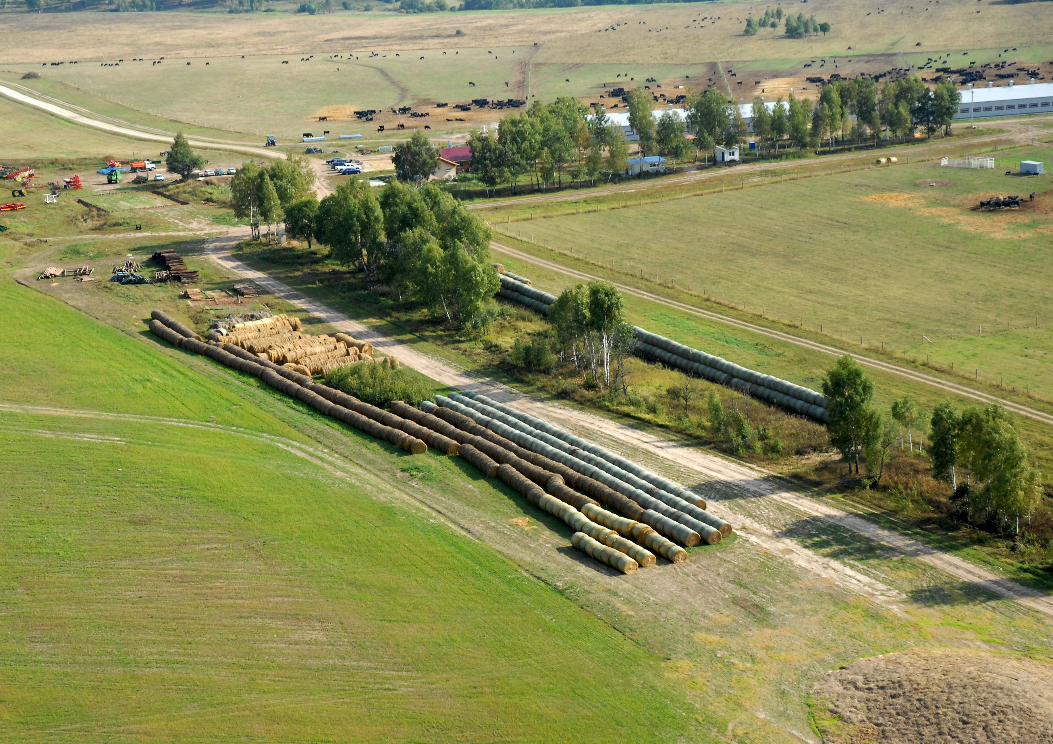 Ферма Калужская область